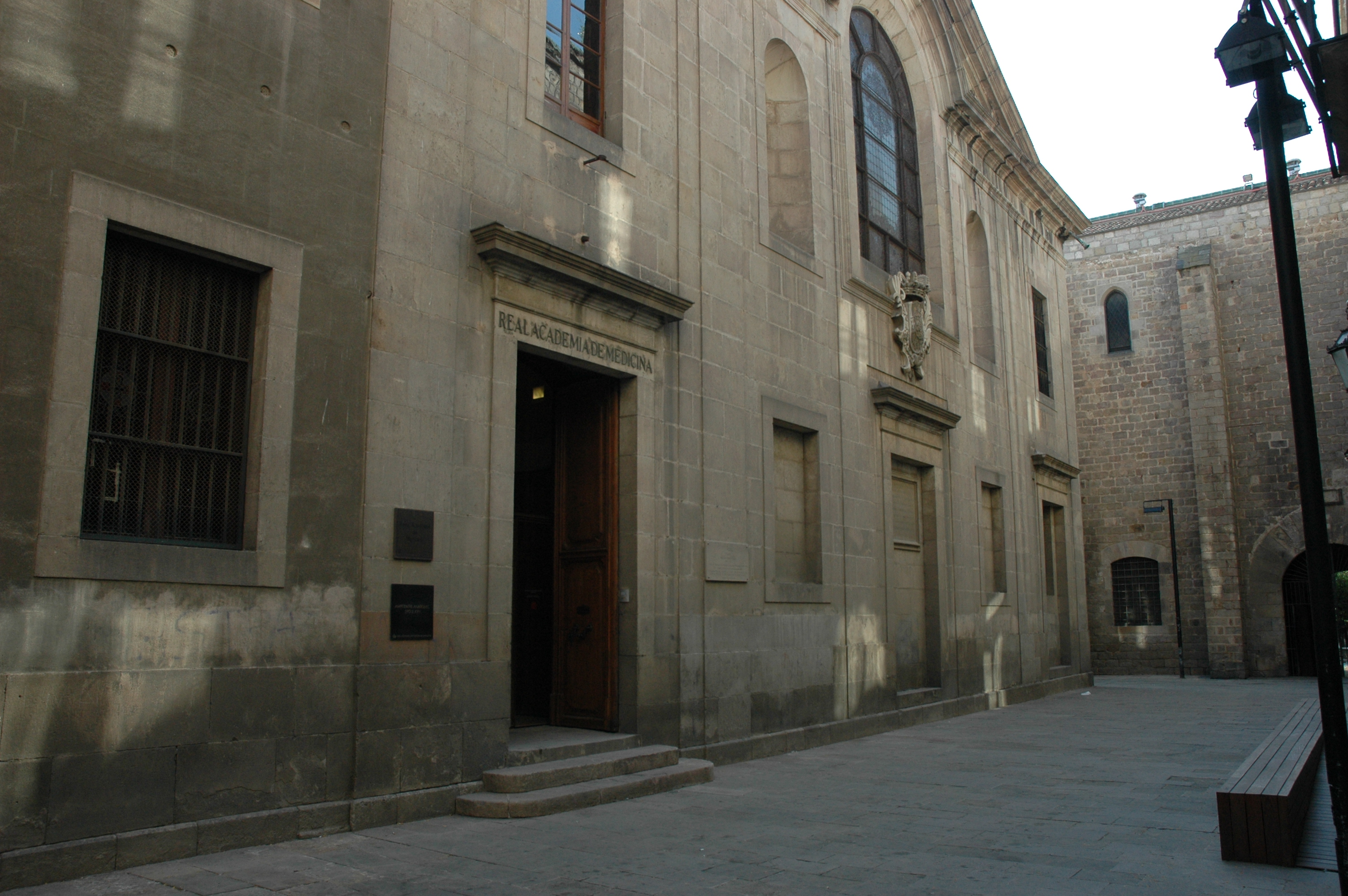 Reial Acadèmia de Medicina de Catalunya